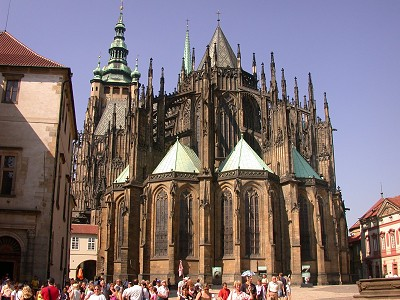 Zelf gemaakt, GNU